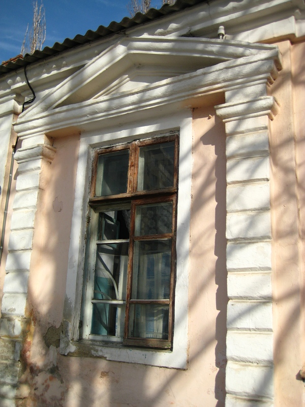 Бывший дом коммерсанта Капусты